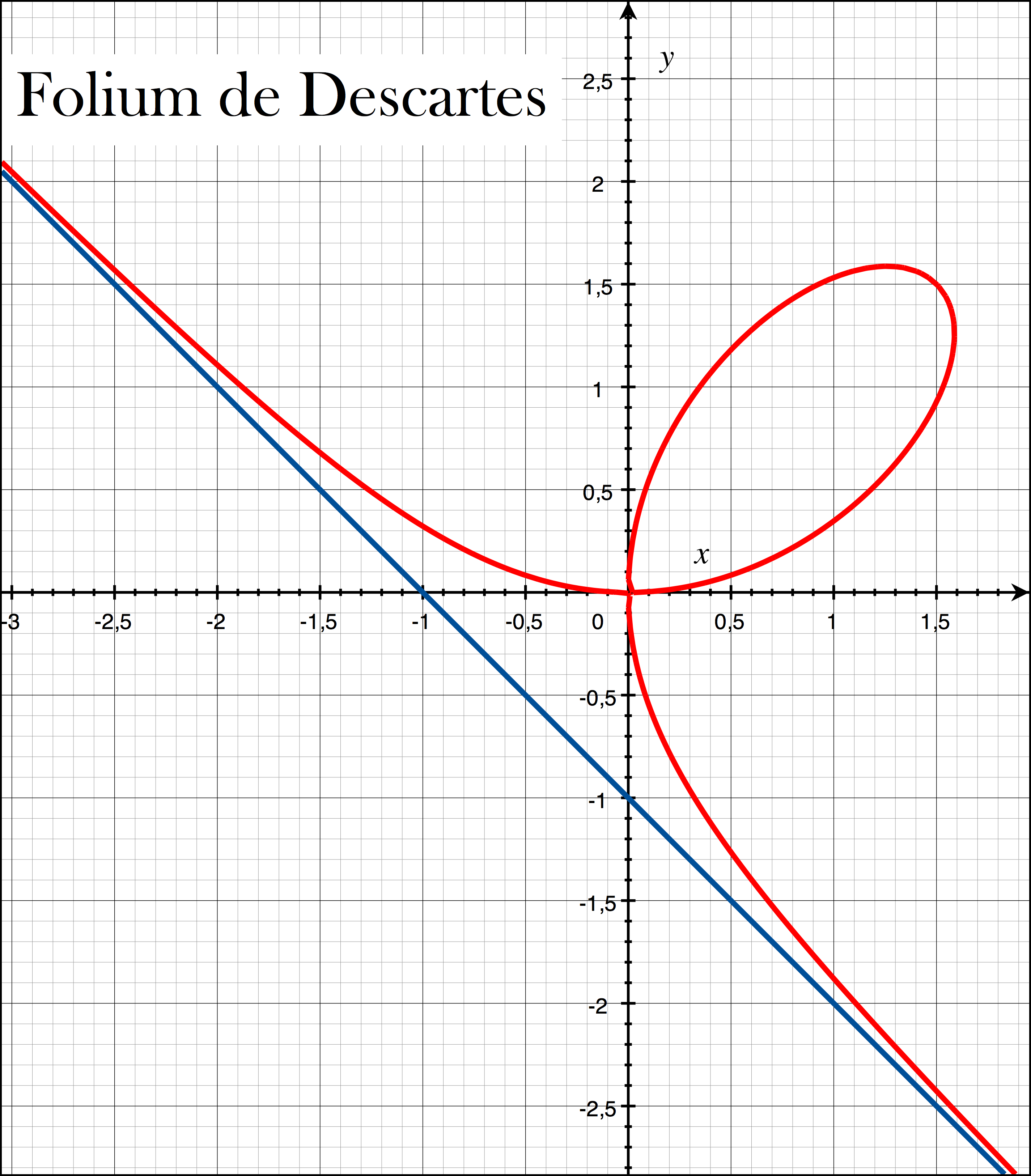 Folium de Descartes et son asymptote